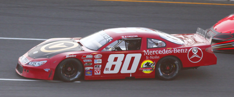 Donald Theetge - Photo Paul-Émile Poulin-Jacques